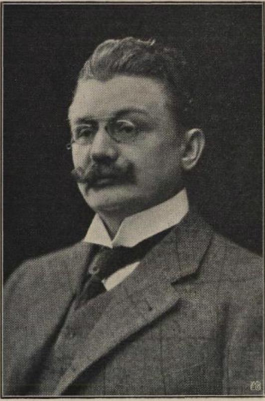 Inge Heiberg (født 11.oktober 1861, død 1. juli 1920 ) var lege, forsker og medisinaldirektør i Belgisk Kongo.